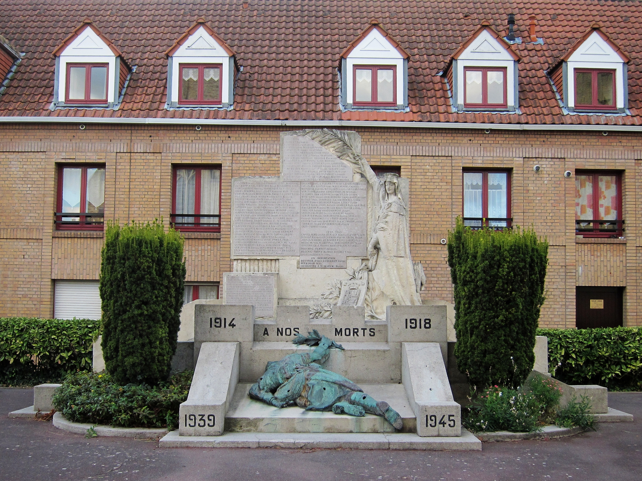 Le monument aux morts de Bergues.